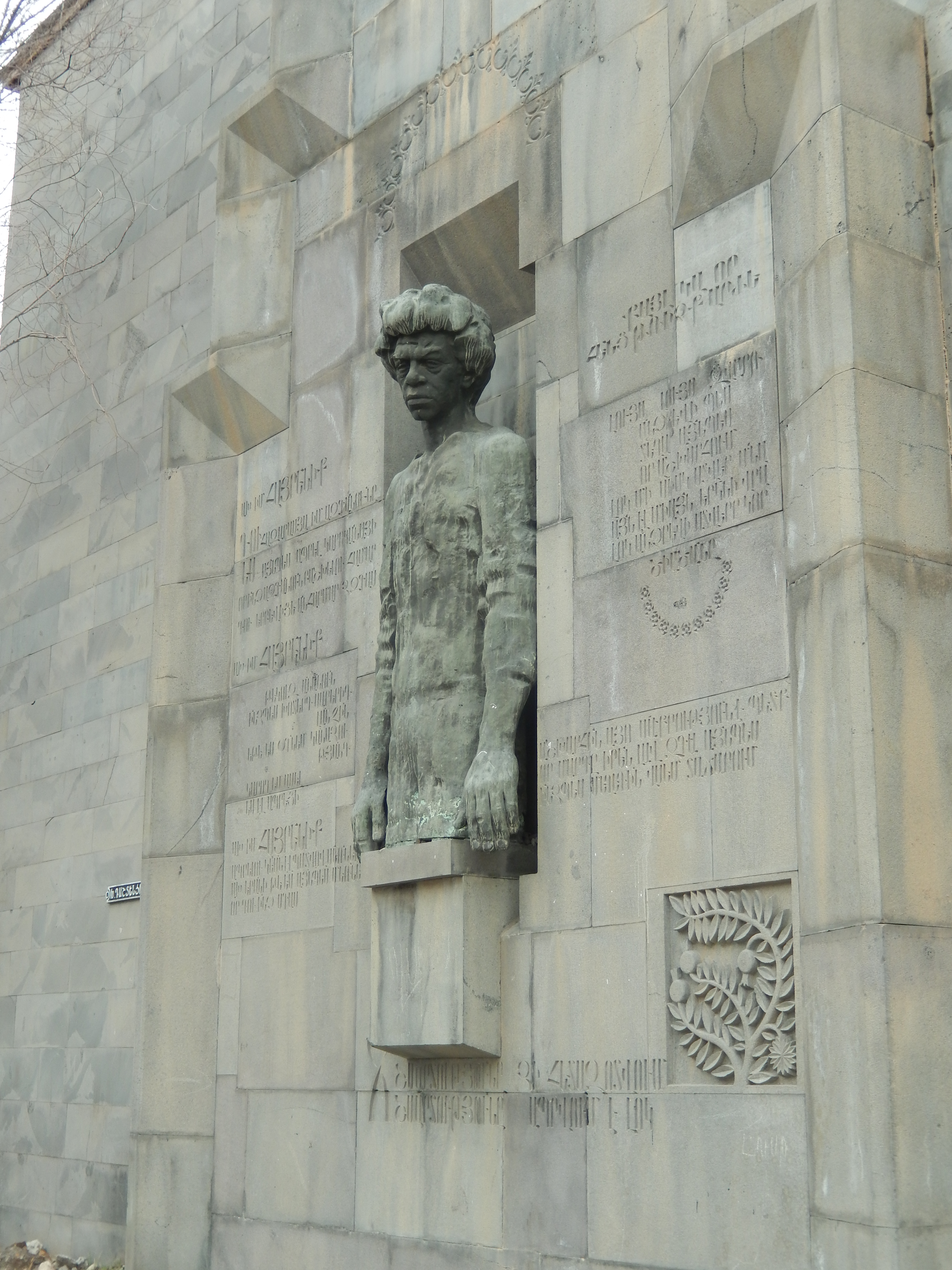 Քանդակագործ՝ Արա Շիրազ, ճարտարապետ՝ Ջիմ Թորոսյան